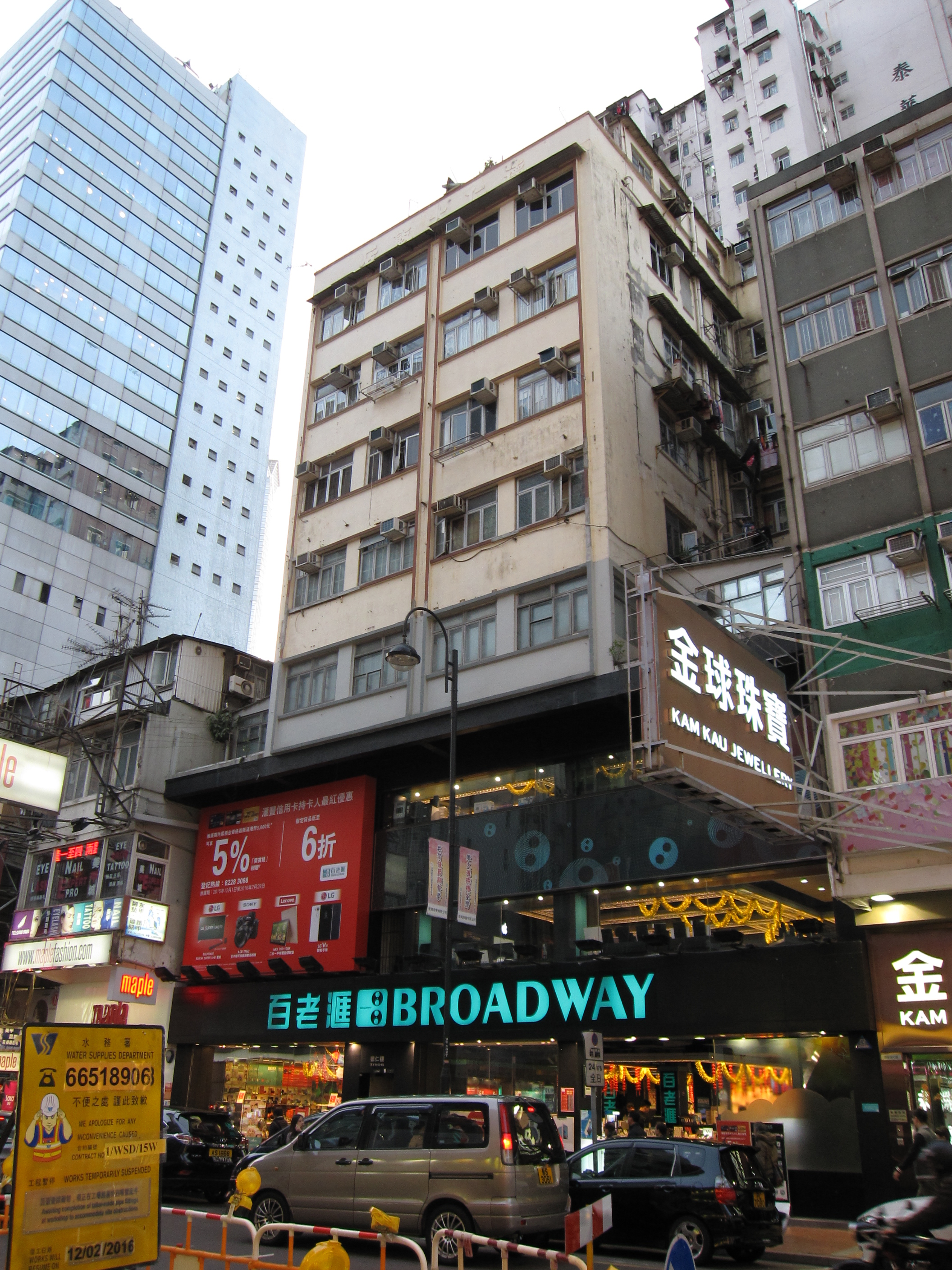 中文（香港）: 德仁樓第五期。